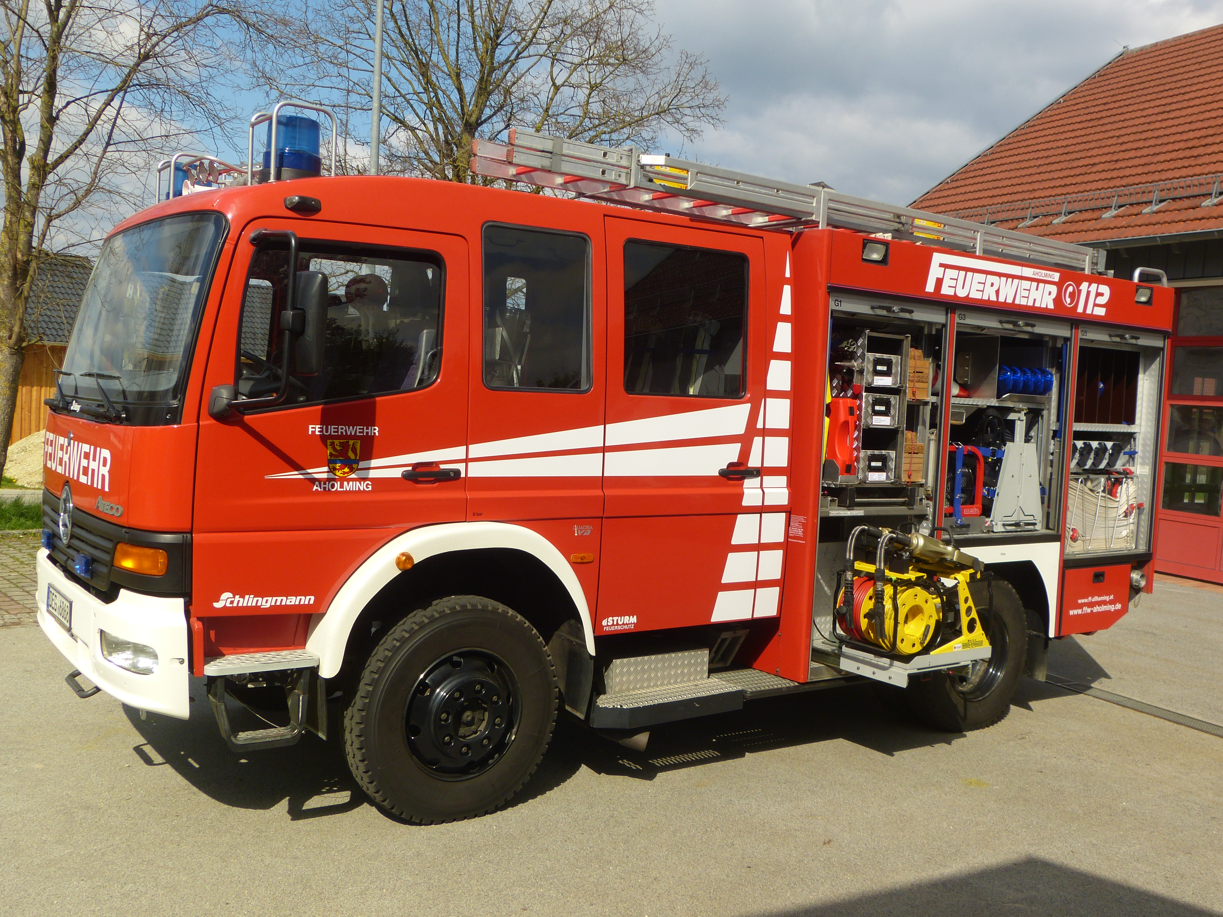 HLF 10/6 der FF Aholming